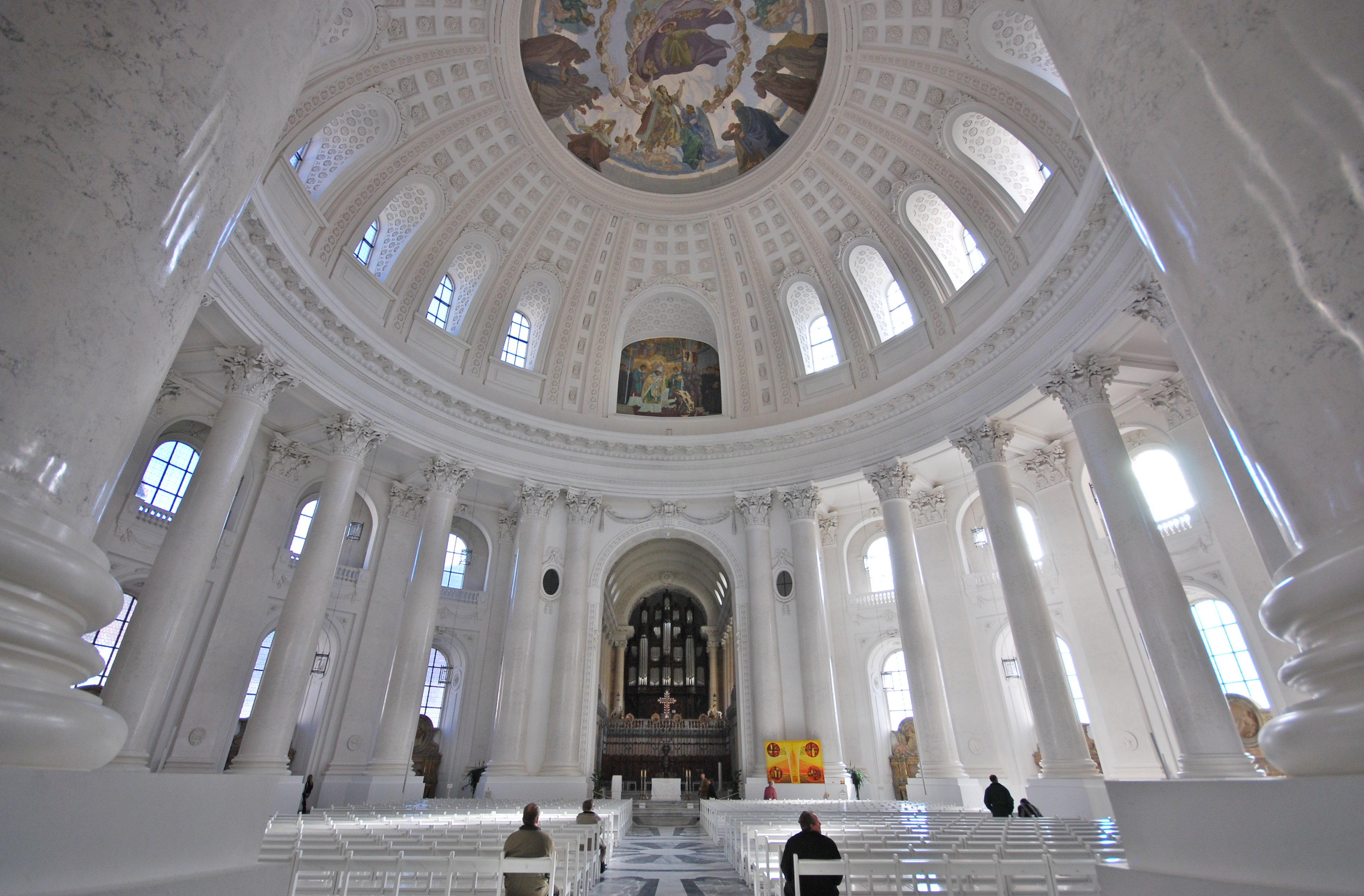 Innenansicht des Doms St. Blasien